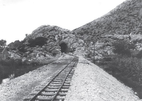 Izgradnja pruge izmedju Rogotina i Ploče